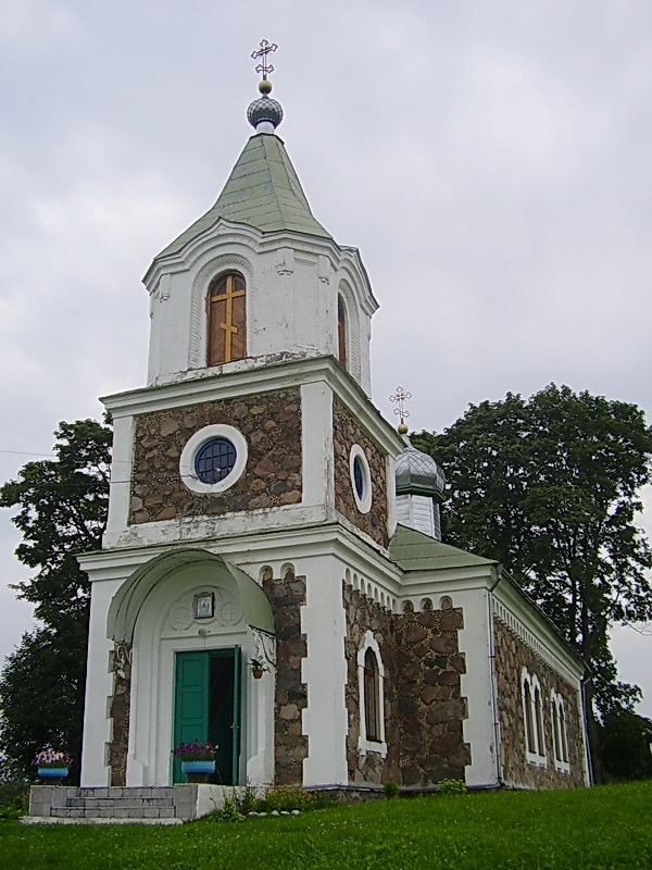 Маркава. Свята-Троіцкая царква